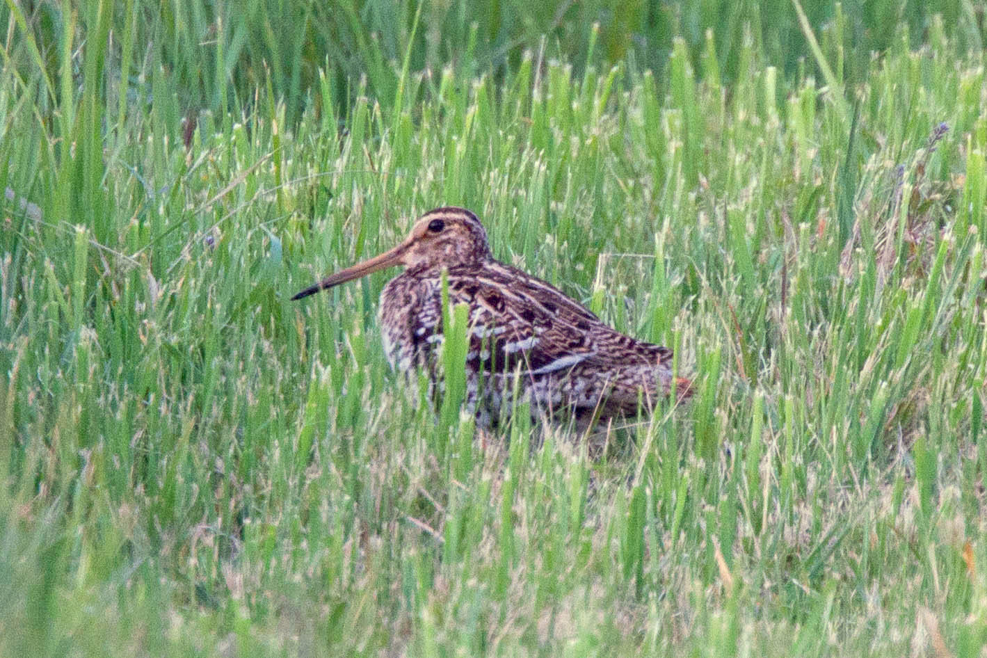 Great Snipe Gallinago media, Belarus